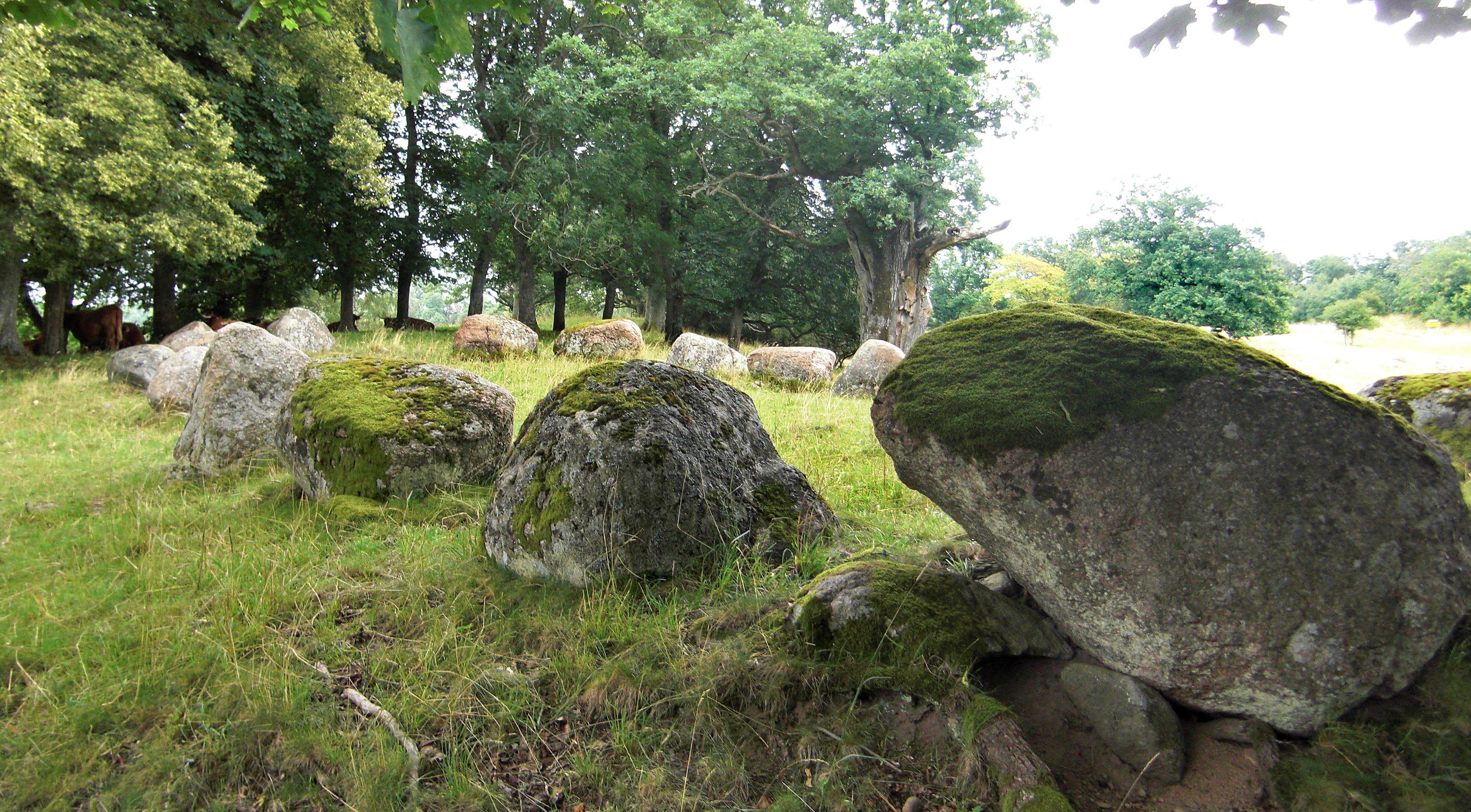 Skeppssättning på Johannishus gravfält (RAÄ-nr Hjortsberga 36:1) i Hjortsberga socken, Medelstads härad, Ronneby kommun, Blekinge, Sverige. Skeppssättningen är en skeppsformig stenkrets med måtten 25×10 meter.